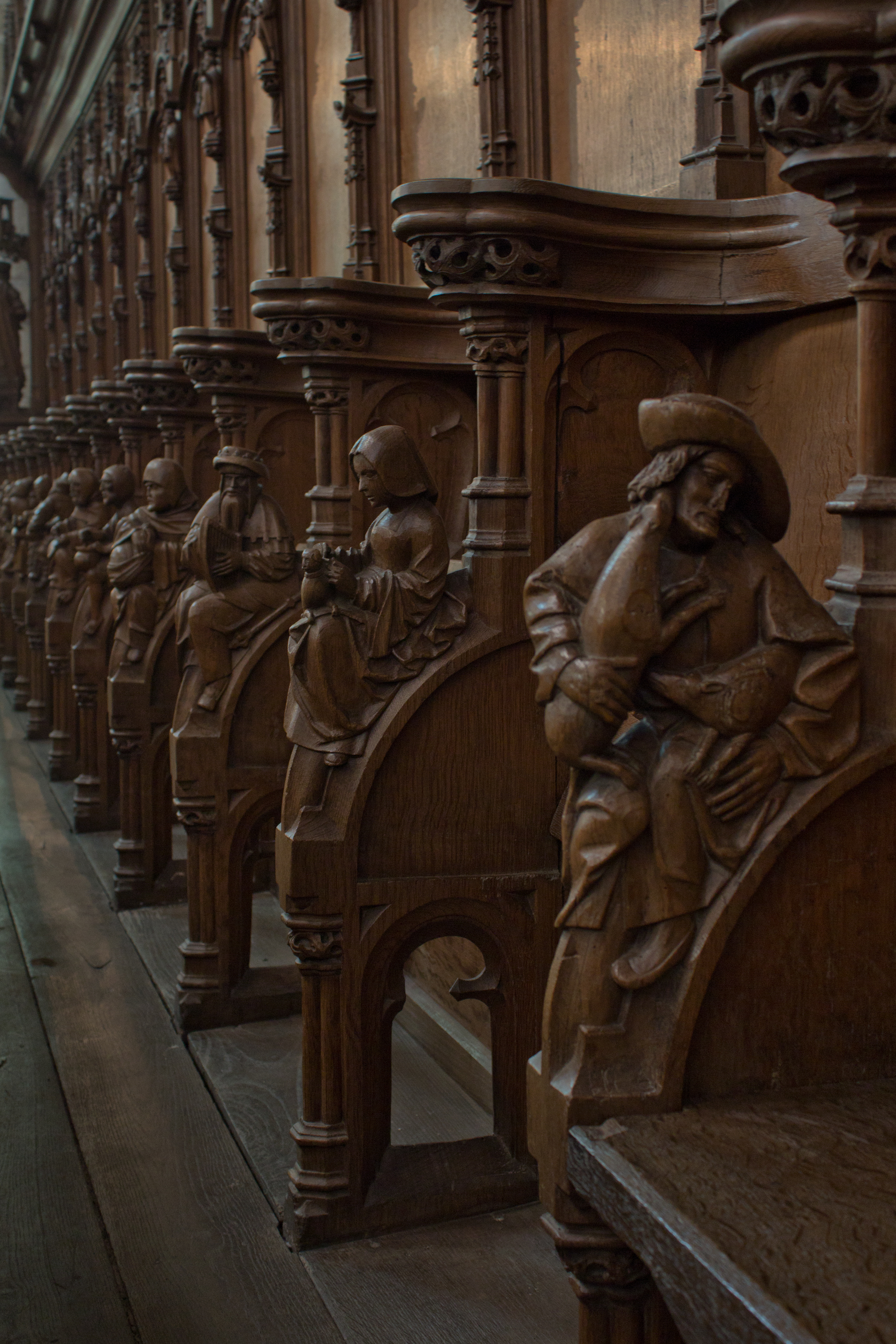 Hoogstraten. Decanale kerk Sint-Catharina